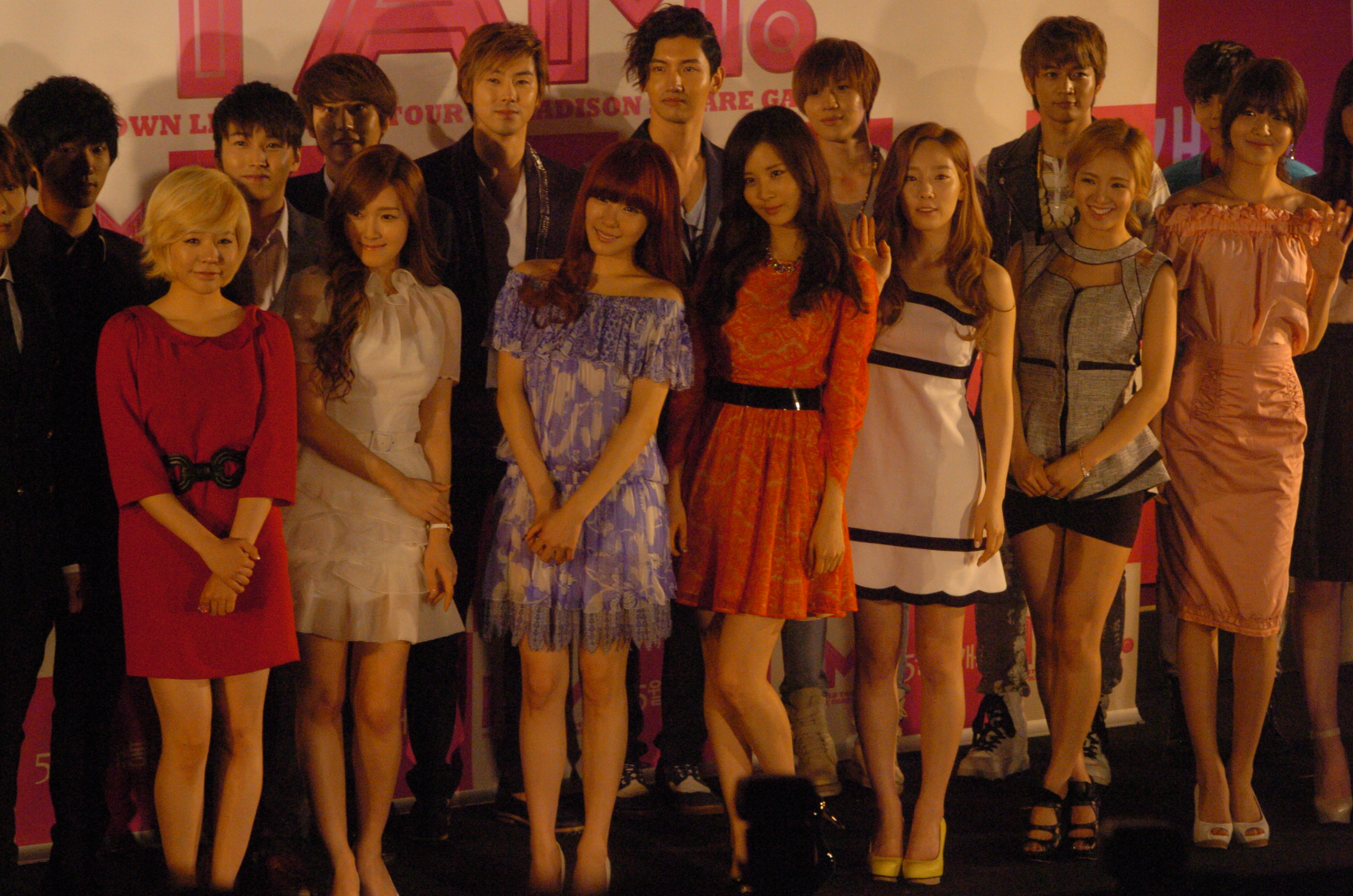 2012년 4월 30일 CGV 영등포 스타리움에서 열린 영화 《I AM.》 쇼케이스에 참석한 소녀시대.